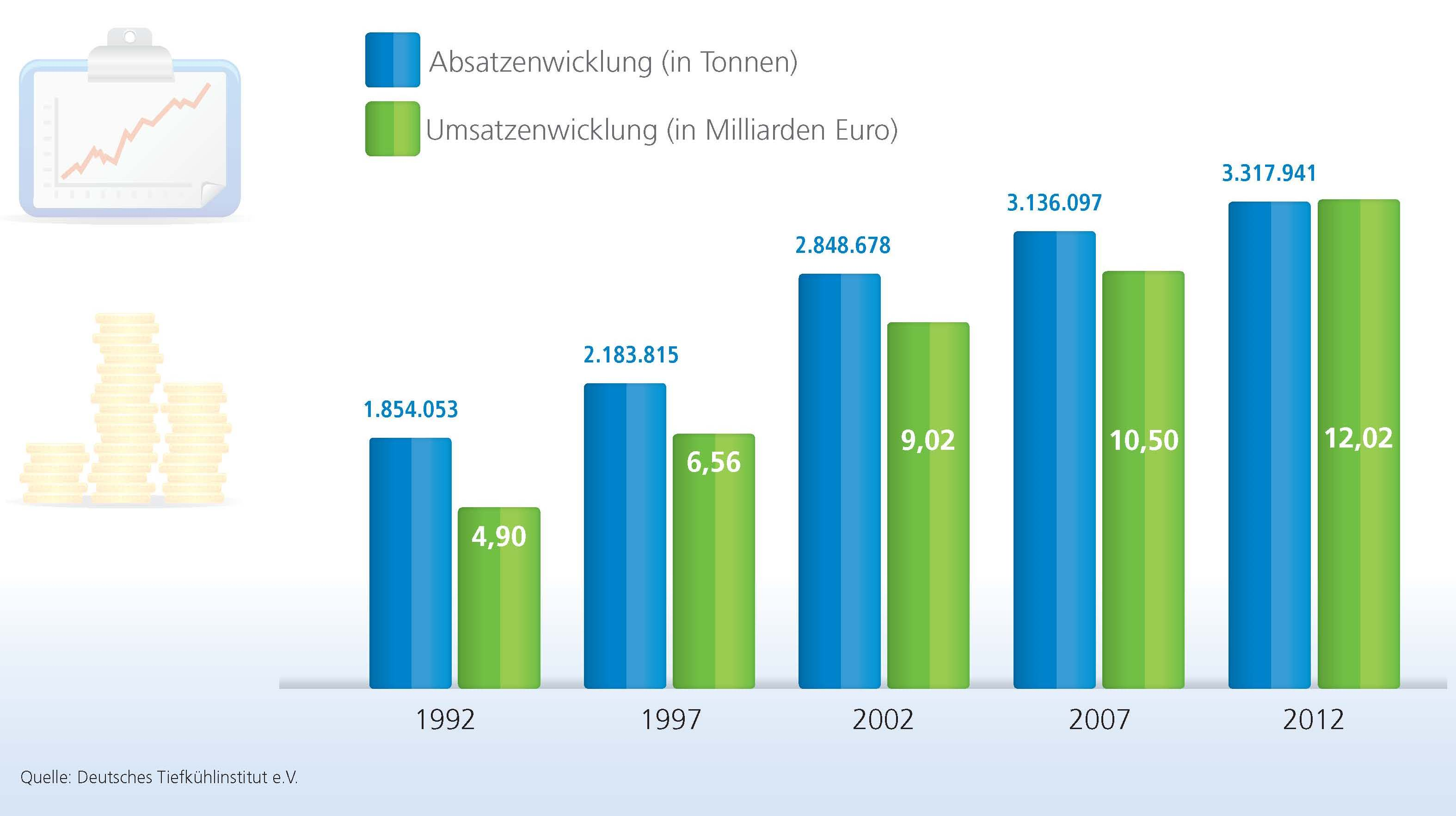 Absatz-/Umsatzentwicklung Tiefkühlkostmarkt in Deutschland 1992-2012 Quelle: Deutsches Tiefkühlinstitut e.V.